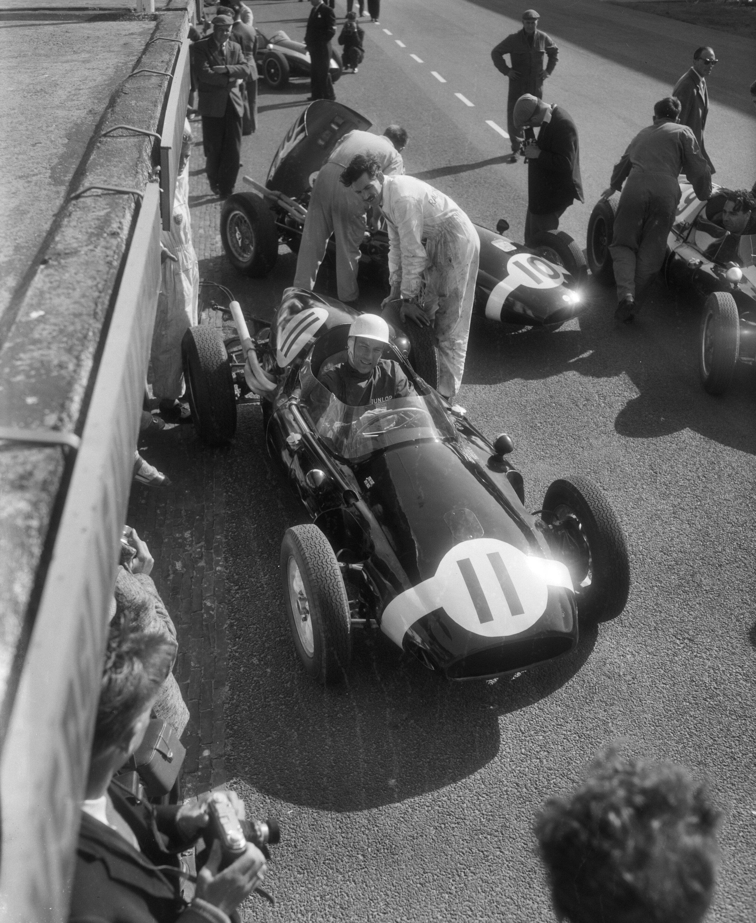 Collectie / Archief : Fotocollectie Anefo Reportage / Serie : Grand Prix Zandvoort 1959 Beschrijving : Training op het Circuit Van Zandvoort van de Grand Prix, Stirling Moss start voor een trainingsronde Datum : 29 mei 1959 Locatie : Noord-Holland, Zandvoort Trefwoorden : auto's, autosport, circuits, sport Persoonsnaam : Moss, Stirling Fotograaf : Pot, Harry / Anefo Auteursrechthebbende : Nationaal Archief Materiaalsoort : Negatief (zwart/wit) Nummer archiefinventaris : bekijk toegang 2.24.01.04 Bestanddeelnummer : 910-4071